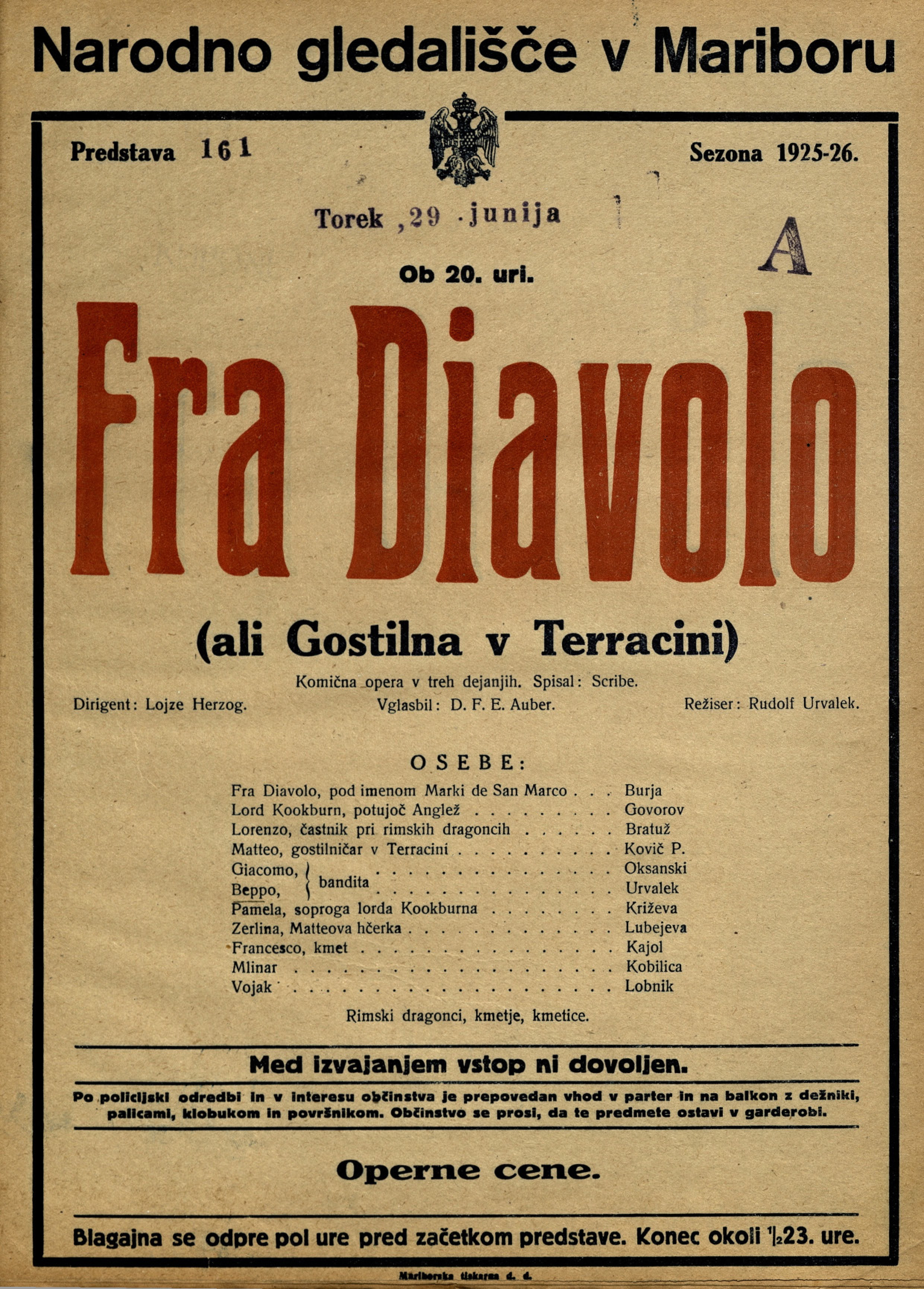 Plakat za predstavo Fra Diavolo v Narodnem gledališču v Mariboru.